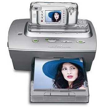 Kodak